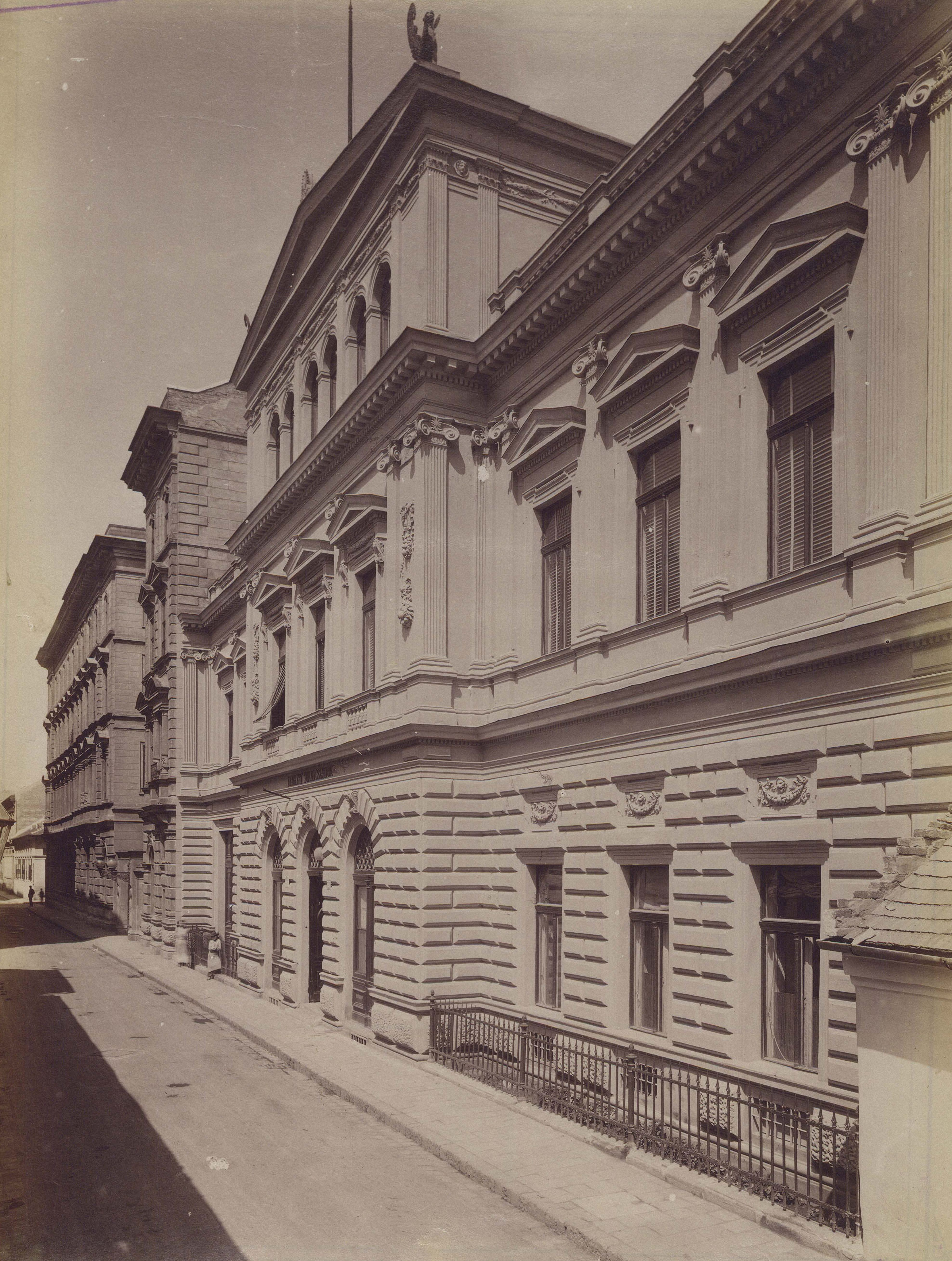 "Az egykori Nemzeti Tornacsarnok épülete. A felvétel 1890 után készült." A kép forrását kérjük így adja meg: Fortepan / Budapest Főváros Levéltára. Levéltári jelzet: HU.BFL.XV.19.d.1.07.060